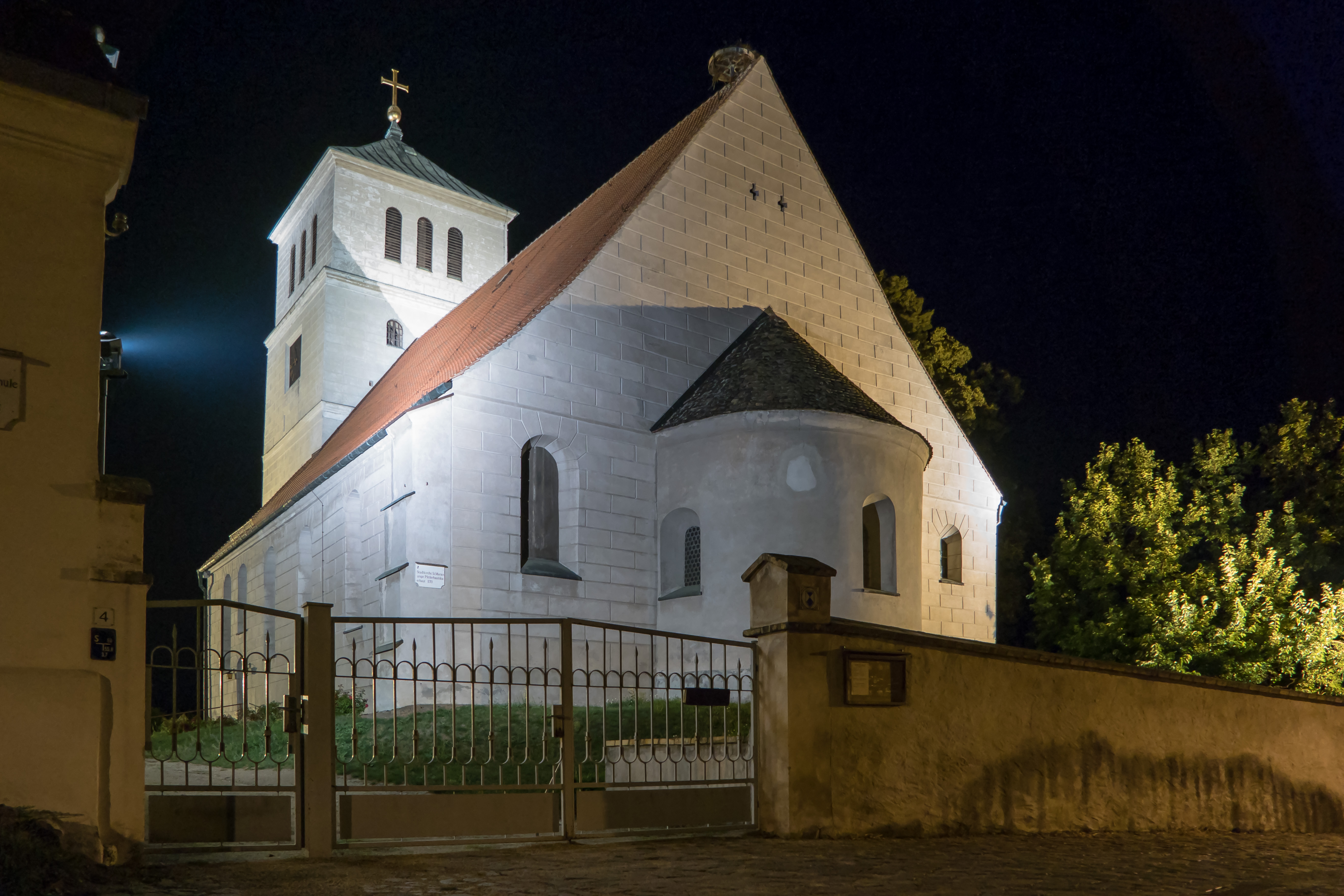 Stadtkirche St. Marien beleuchtet, Kirchberg 1 in Schildau